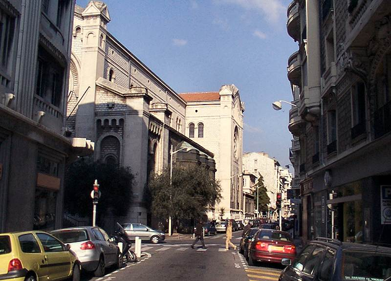 Nice-Quartier des Musiciens Rue Cronstadt